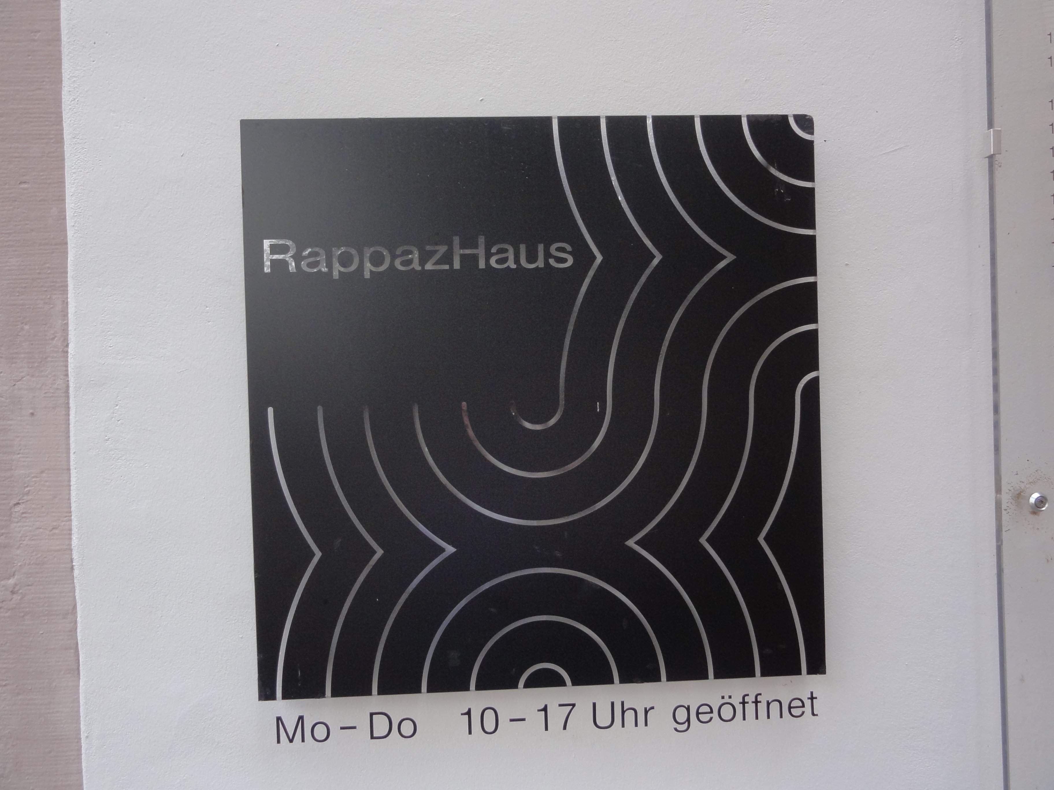 Basel — Klingental 11, Schild „RappazHaus“ Info GPS data may be inaccurate. EXIF data regarding date and time may be inaccurate.